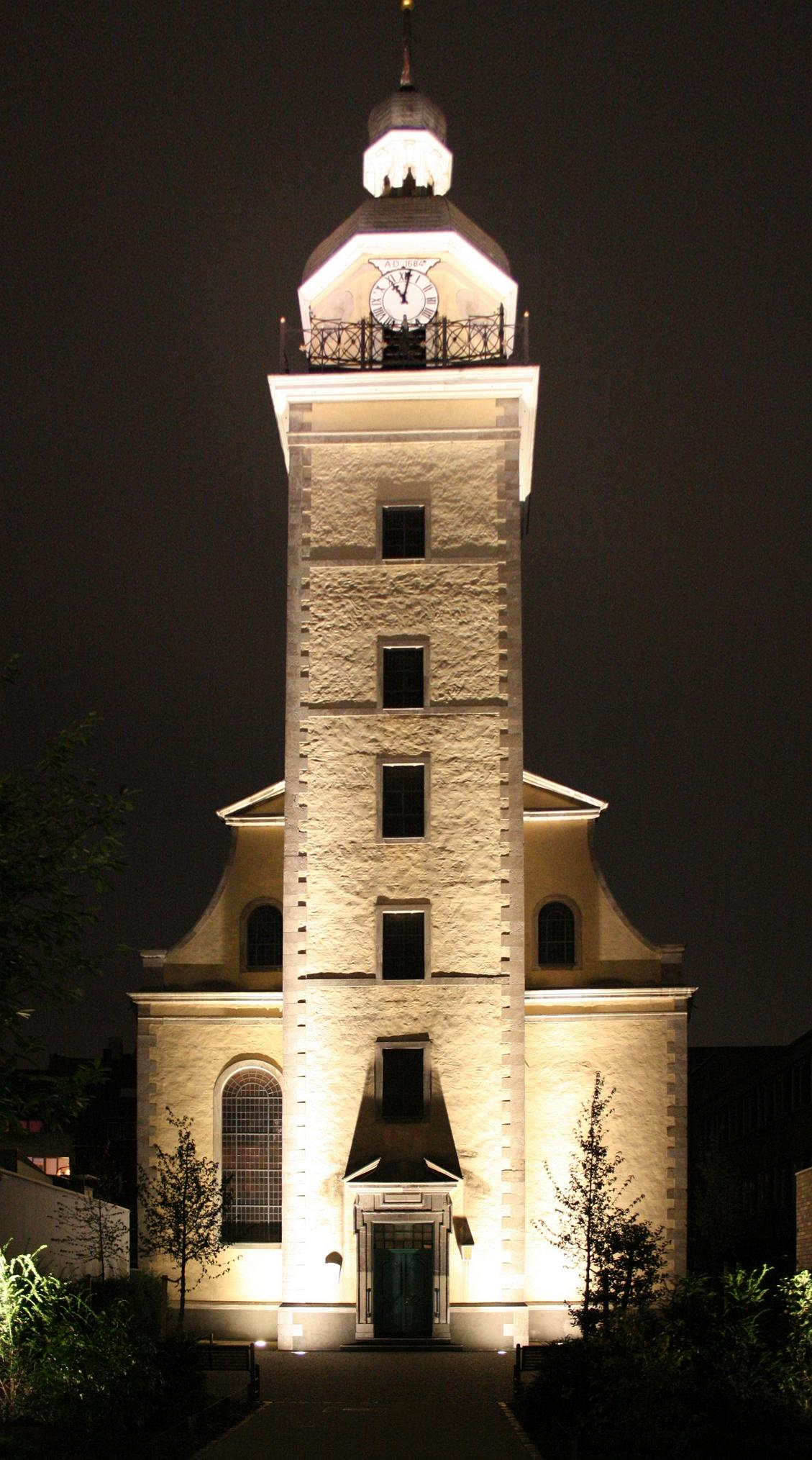 Neanderkirche in der Bolkerstrasse, Düsseldorf, Altstadt